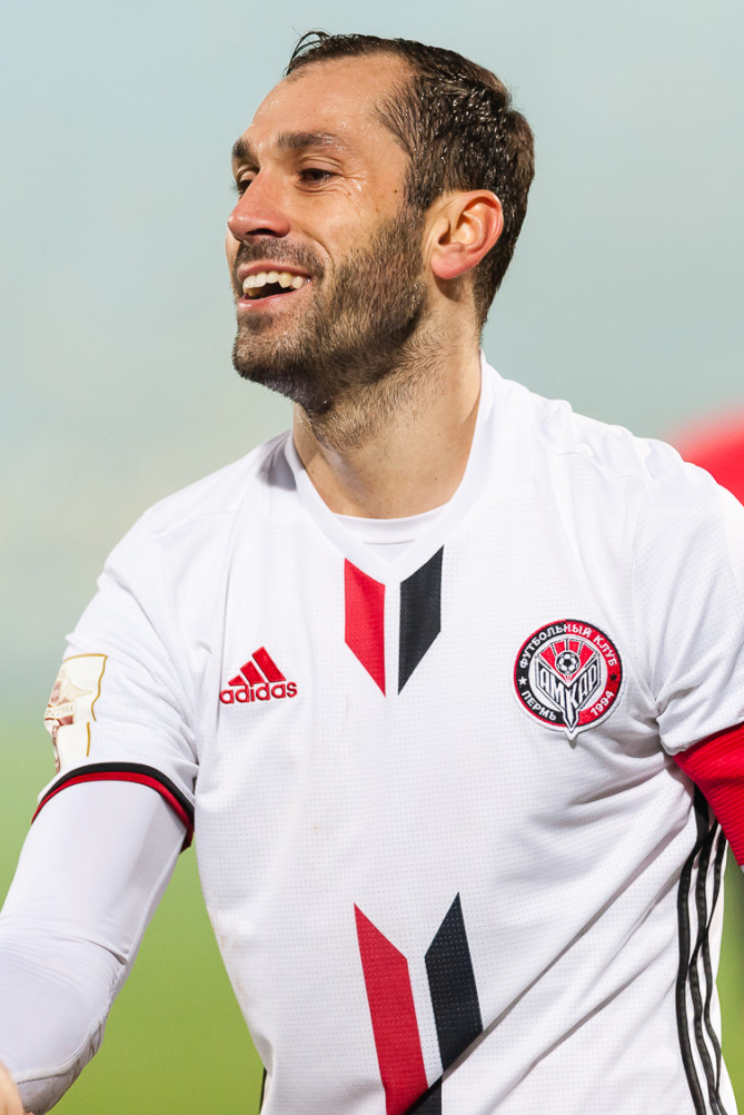 «Ростов» и «Амкар» испугались пенальти